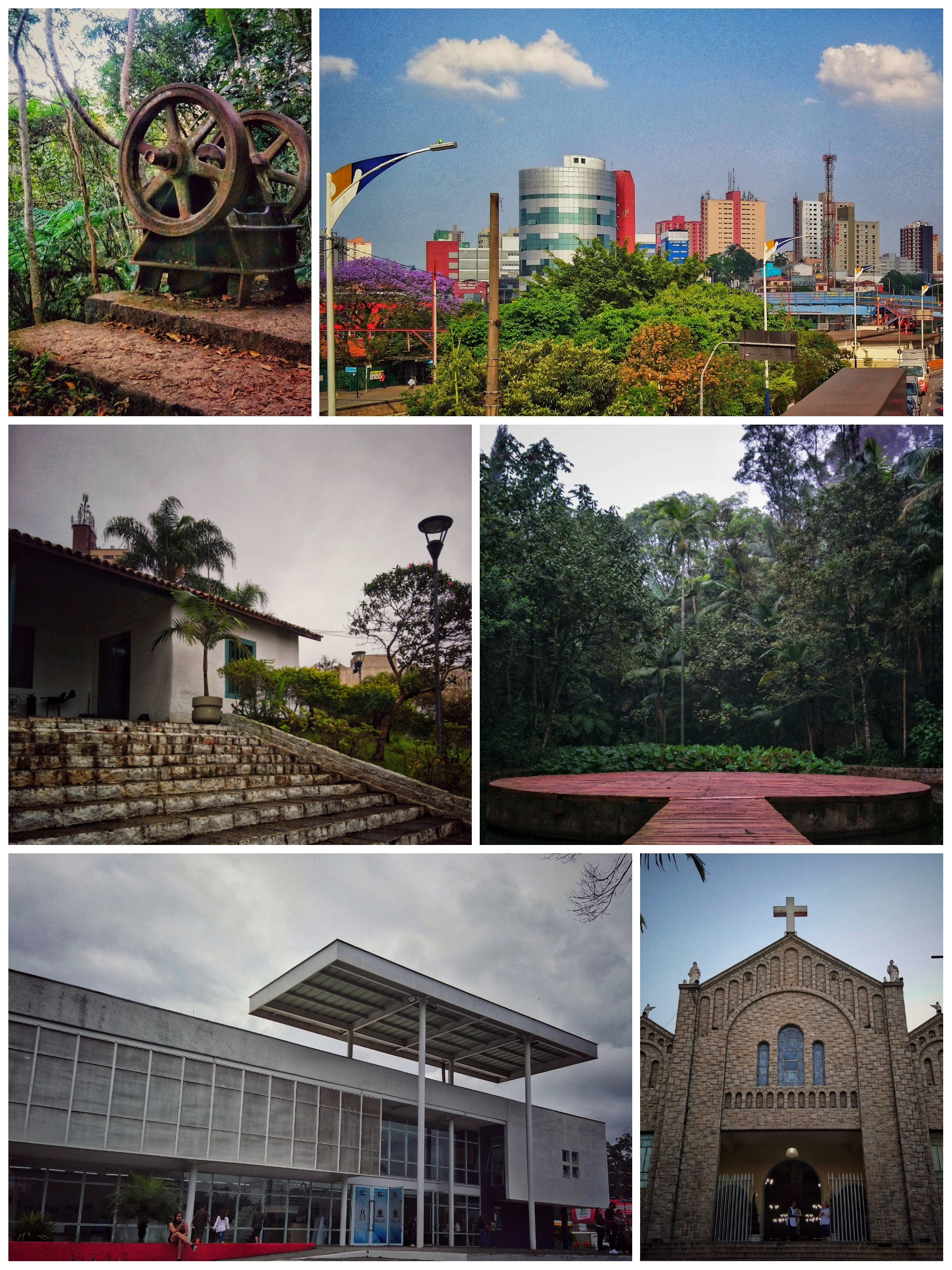 Série de fotos da cidade de Mauá